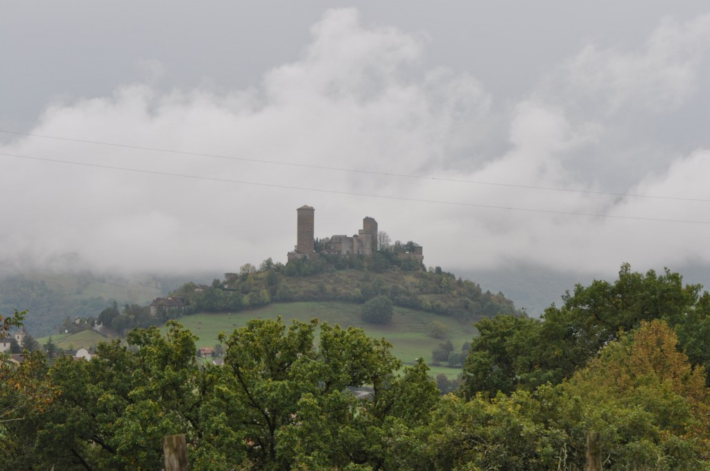 Las tors de Sent Laurenç dins lo Carcin.